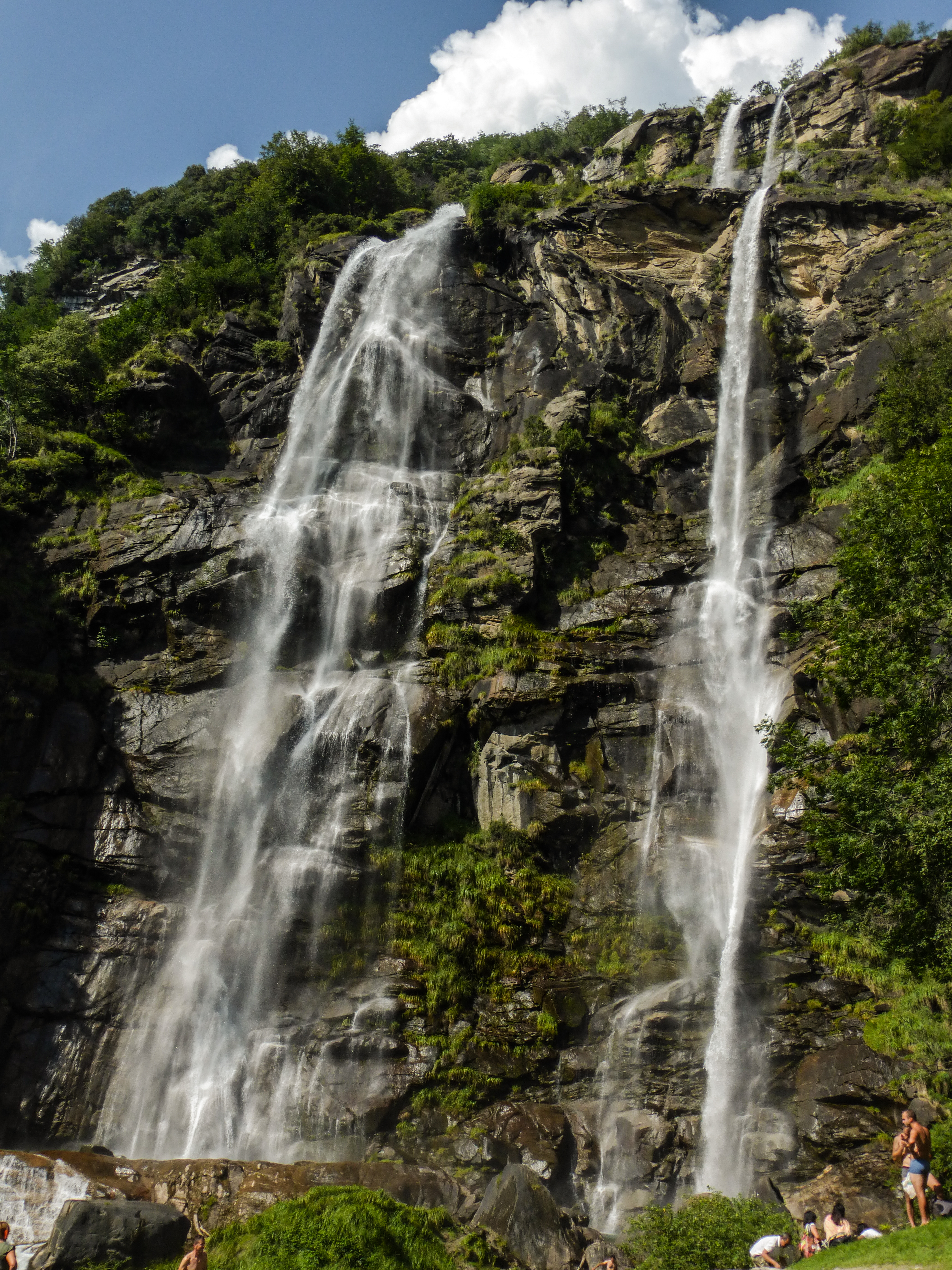 Cascate dell'Acquafraggia da vicino